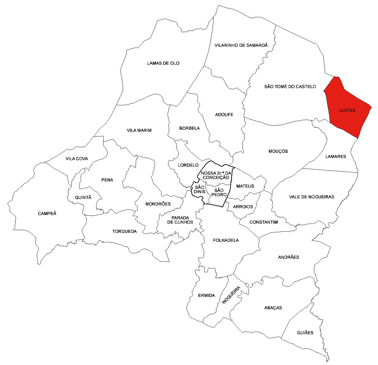 Freguesia de Justes (concelho de Vila Real)